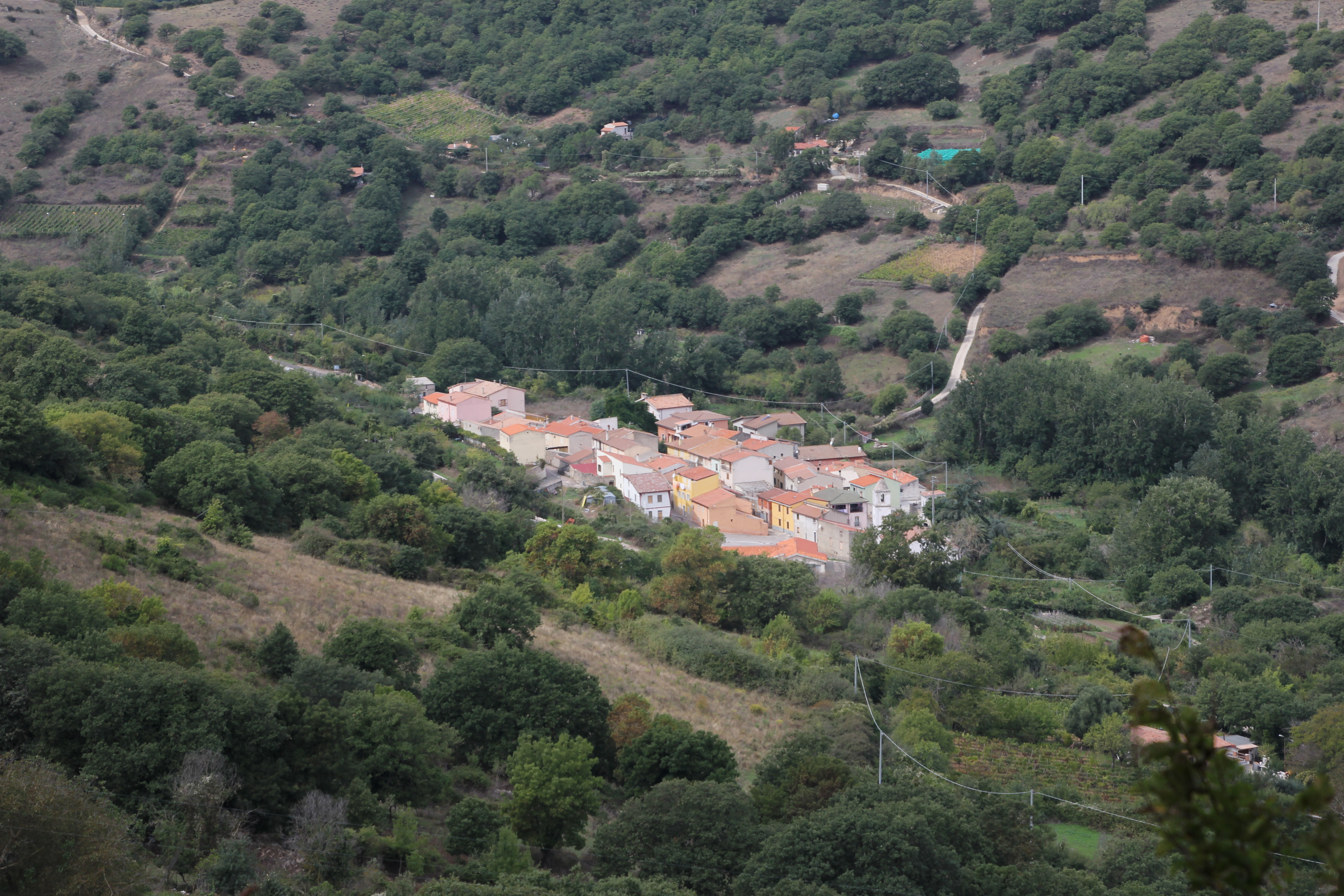 Pattada, frazione Bantine